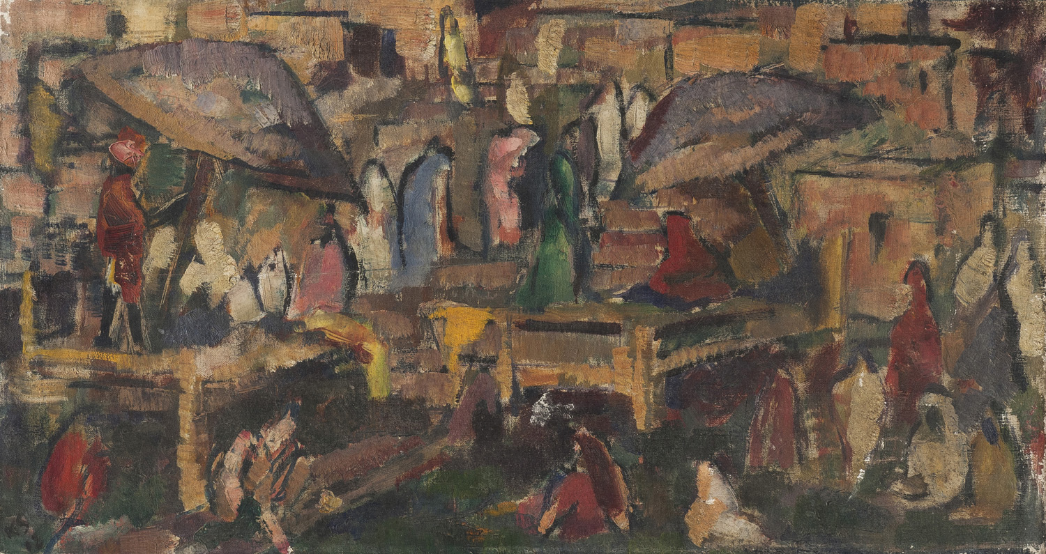 Karli Sohn-Rethel: Benares, Szene am Flussufer, um 1913